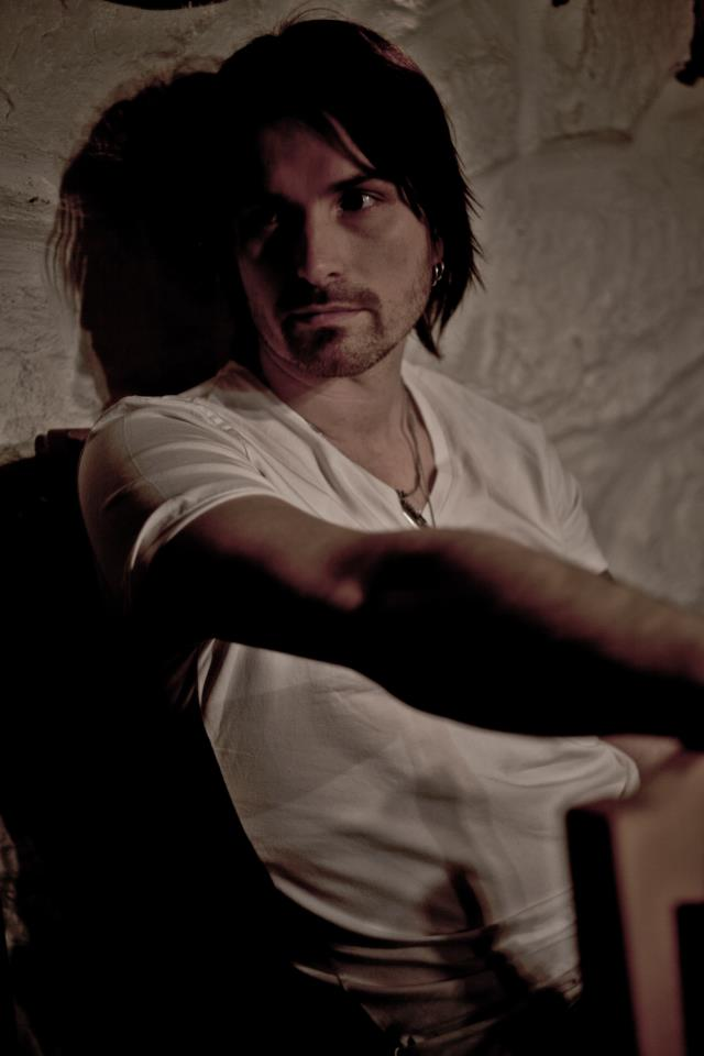 Anders "MAV" Lundström